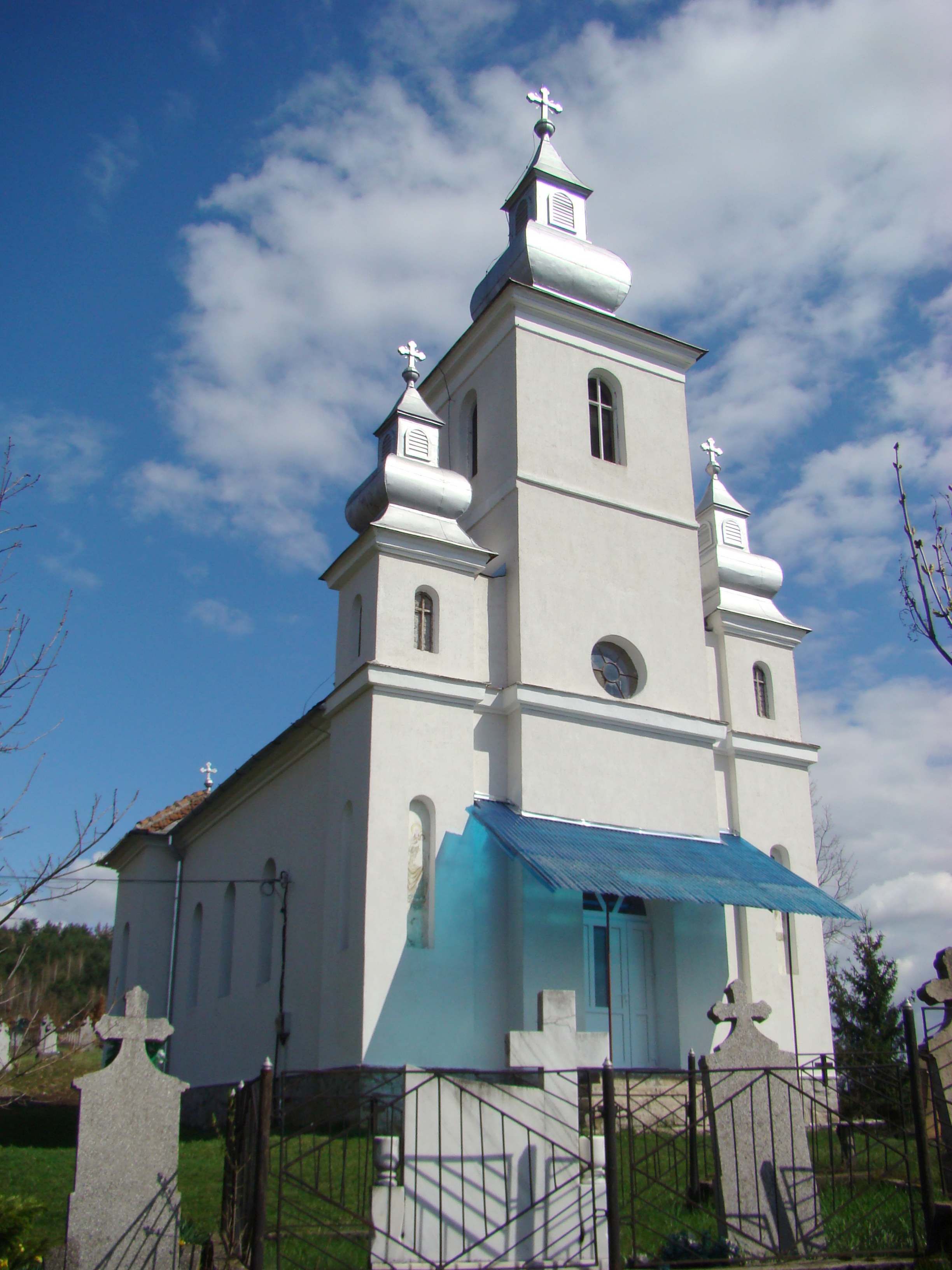 Biserica „Sfântul Ierarh Nicolae”, sat OBÂRŞA; comuna TOMEŞTI